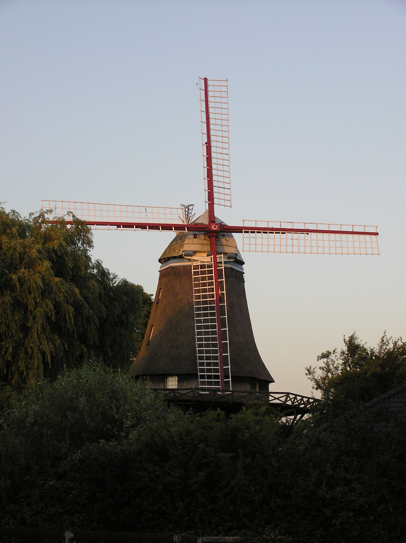 Windmill Handorf,NS,Germany